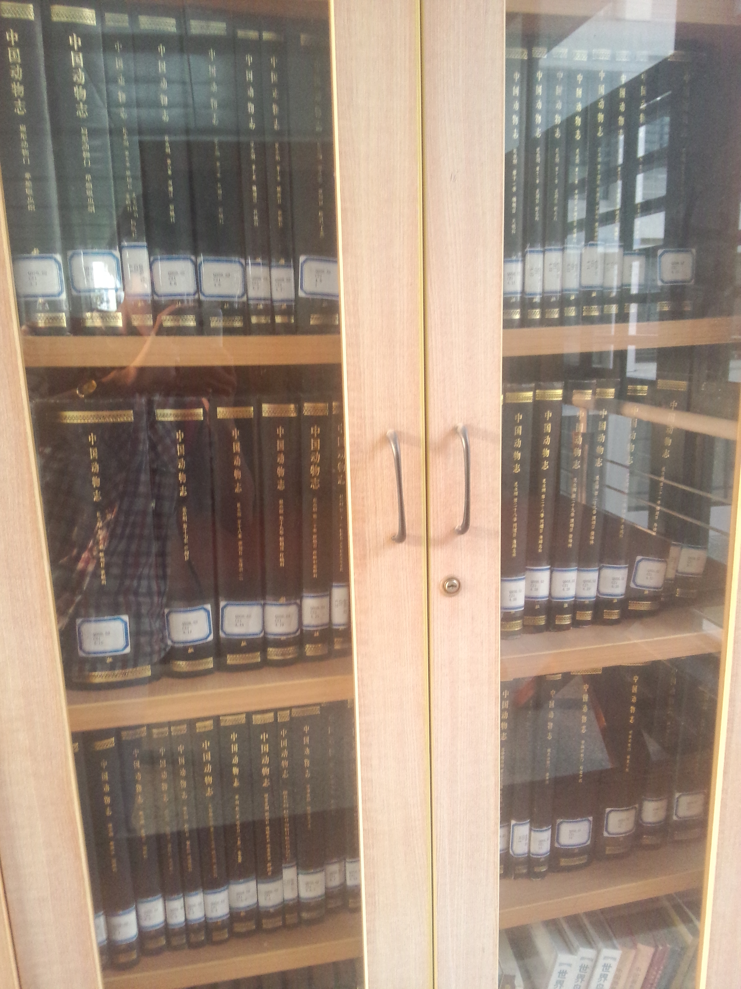 保存于浙江大学生物实验中心的一套《中国动物志》（照片展示部分）